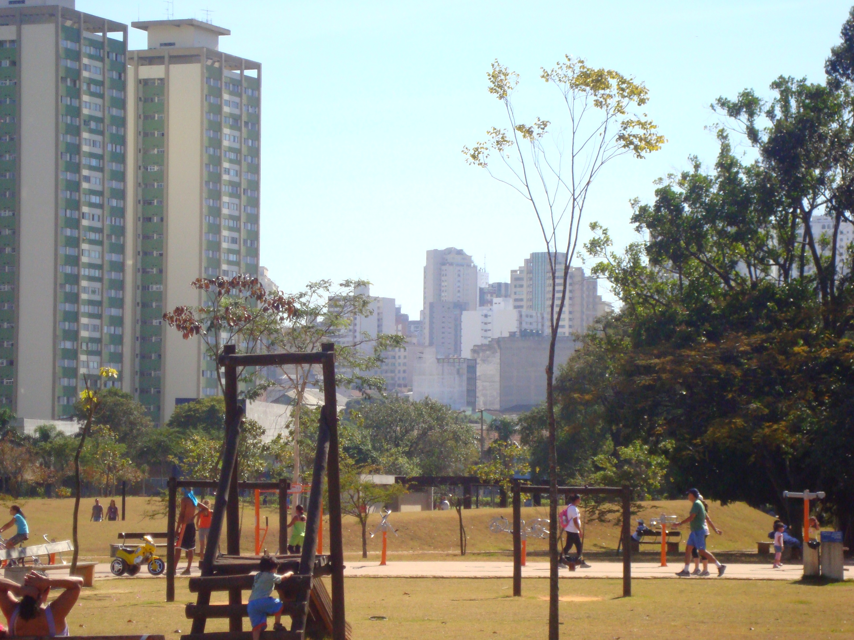 Foto do Playground do Parque da Juventude e ao fundo o skyline no bairro de Santana, zona norte de São Paulo/SP